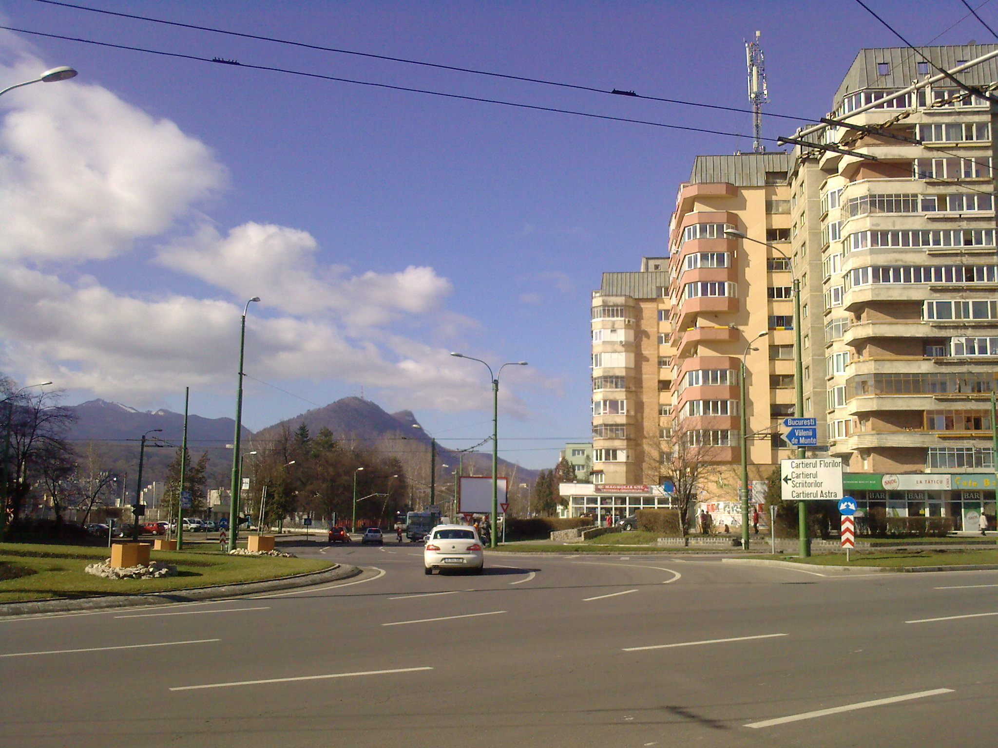 Qartier Florilor, Braşov, Roumanie